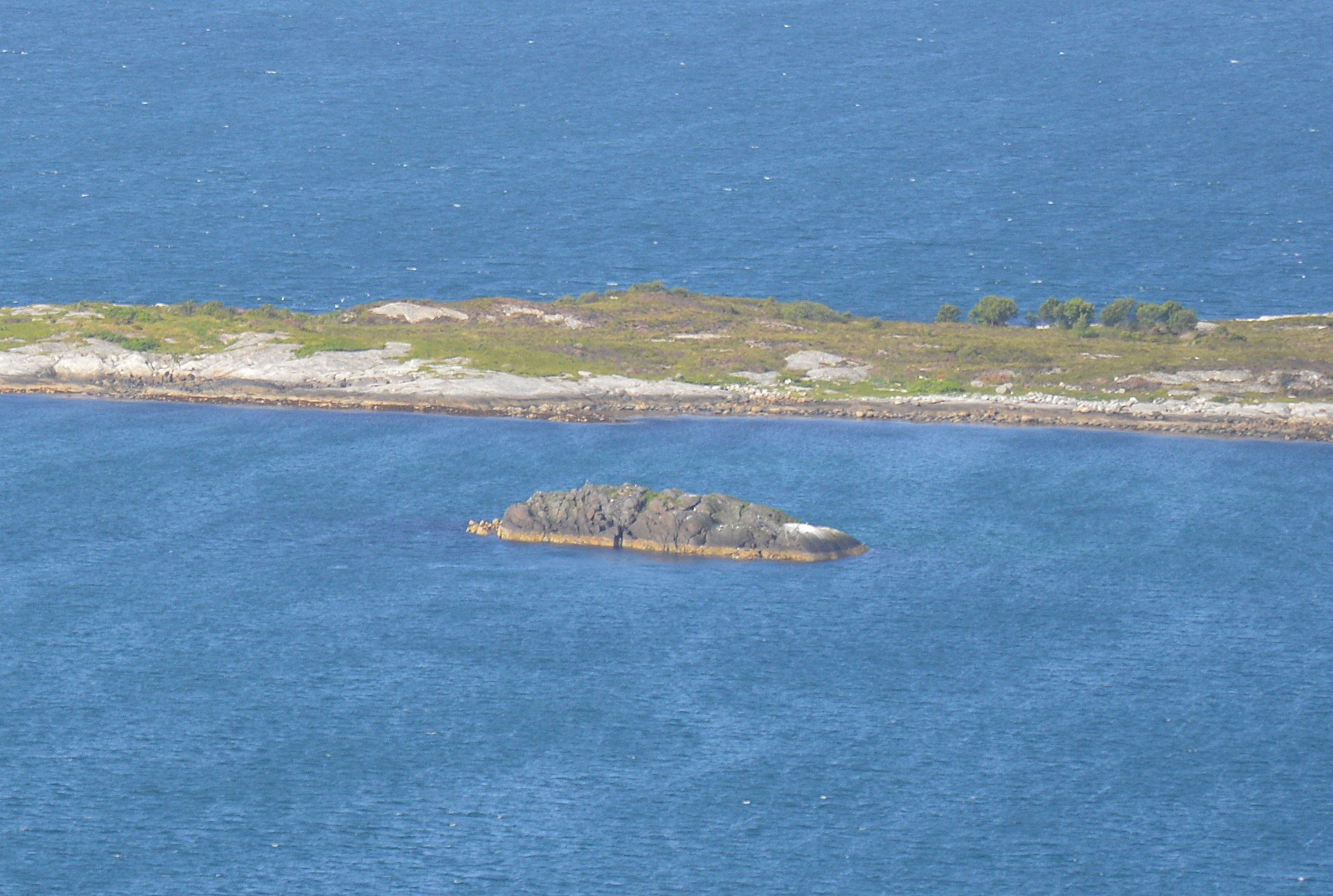 Lykjelsholmen